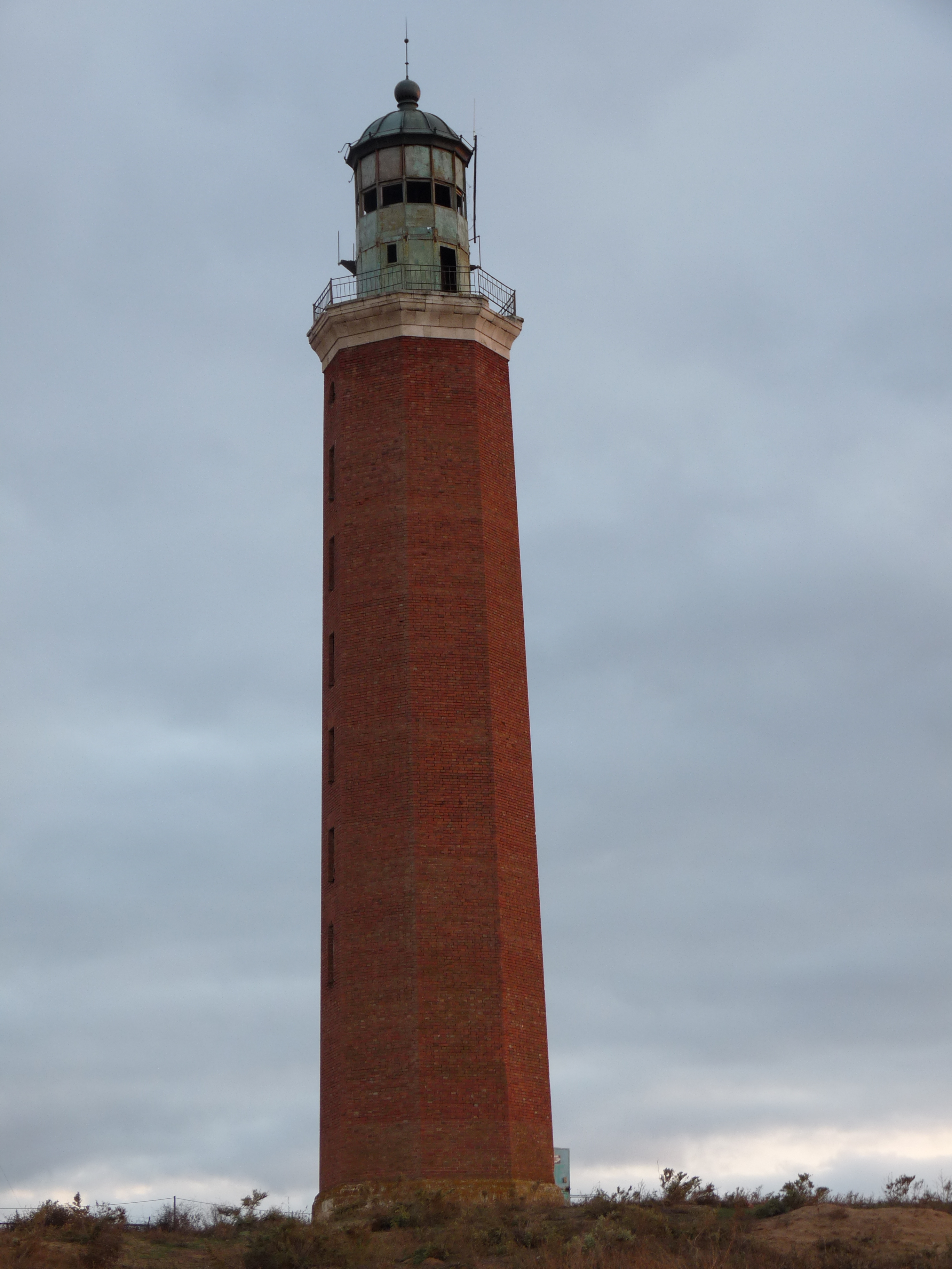 Маяк Петра Первого. Астраханская область, Лиманский район, село Вышка.